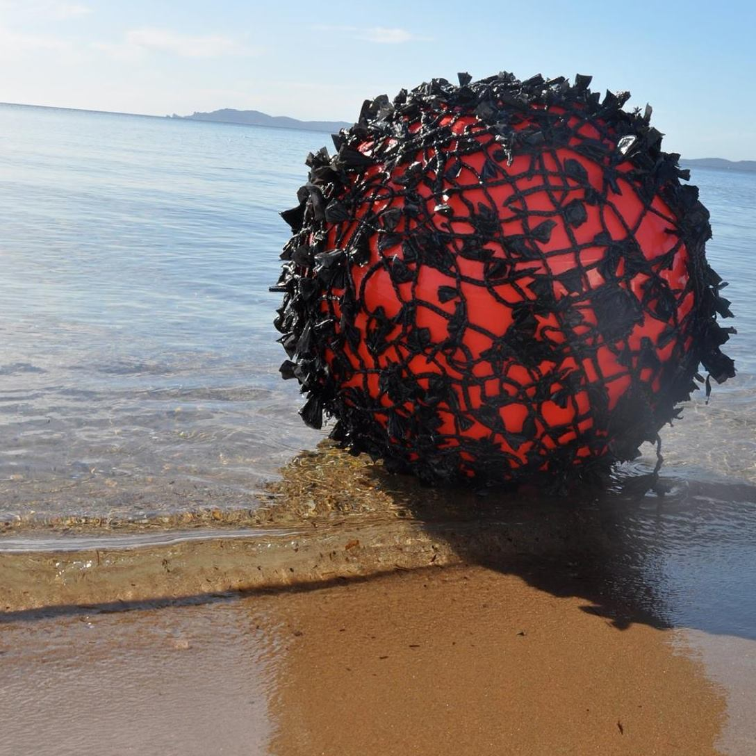 Sacs en plastique tressés